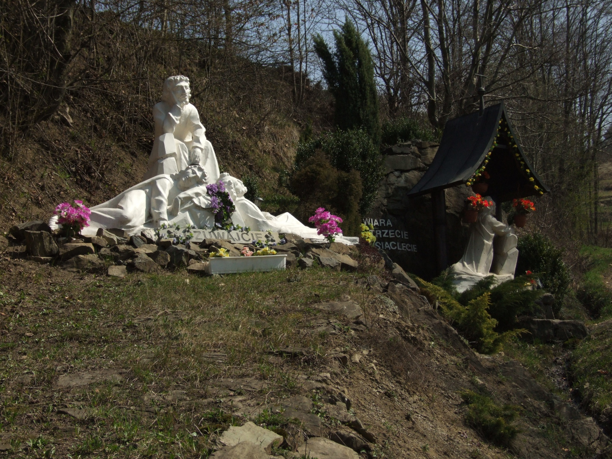 Kalwaria Tokarska w Tokarni (powiat myślenicki)